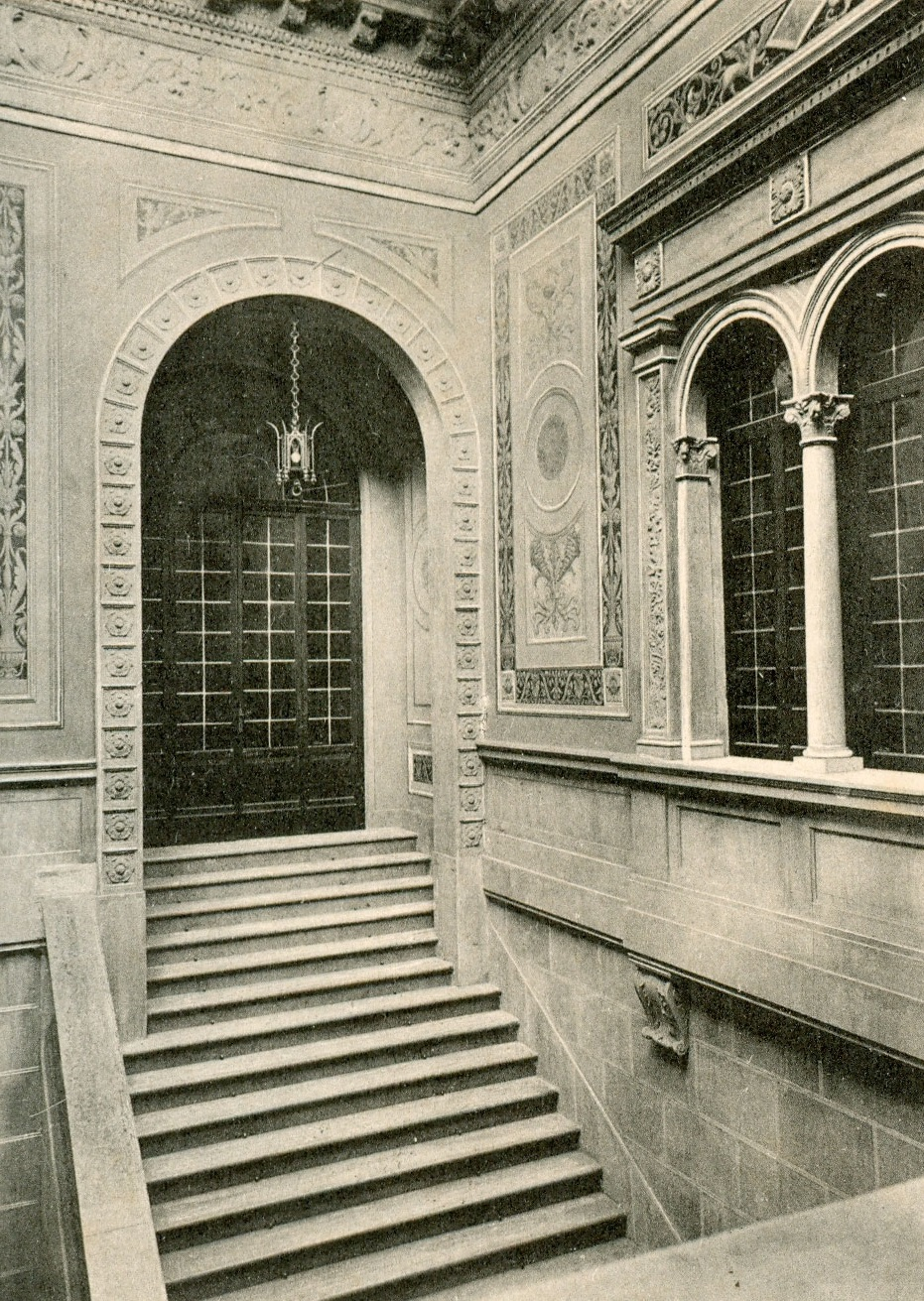 Mirandola - Scalone del Municipio